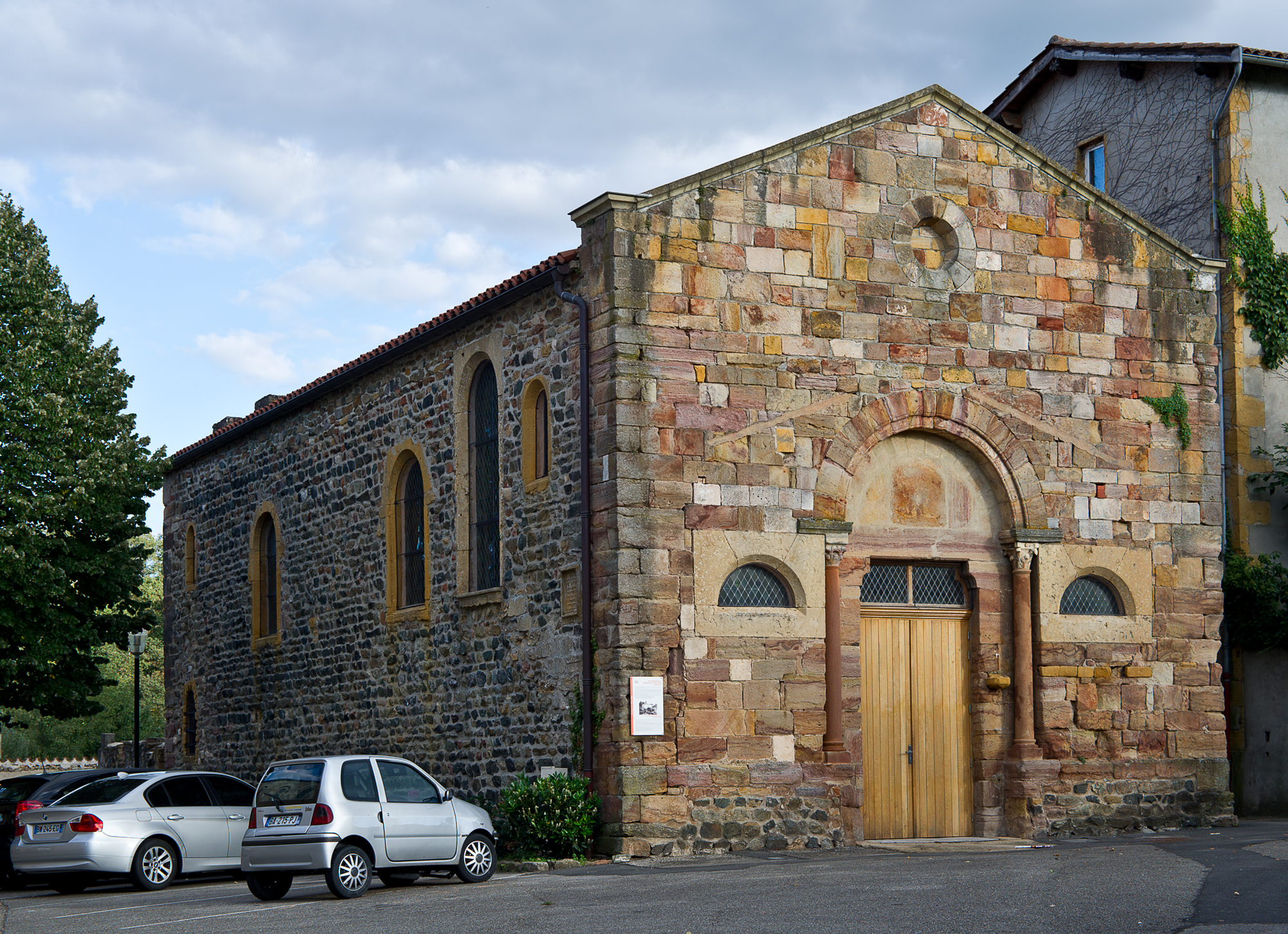 Église Saint-Jean-Baptiste de Sain-Bel, (Inscrit, 1926) .